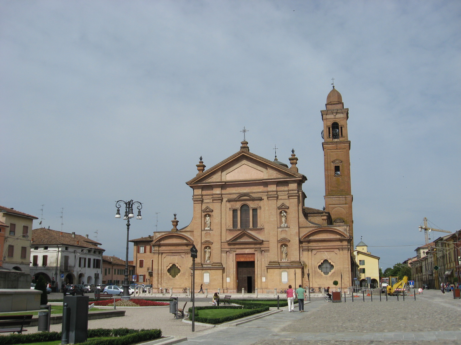 Novellara (Reggio Emilia) - Scorcio della piazza con la Chiesa collegiata di Santo Stefano